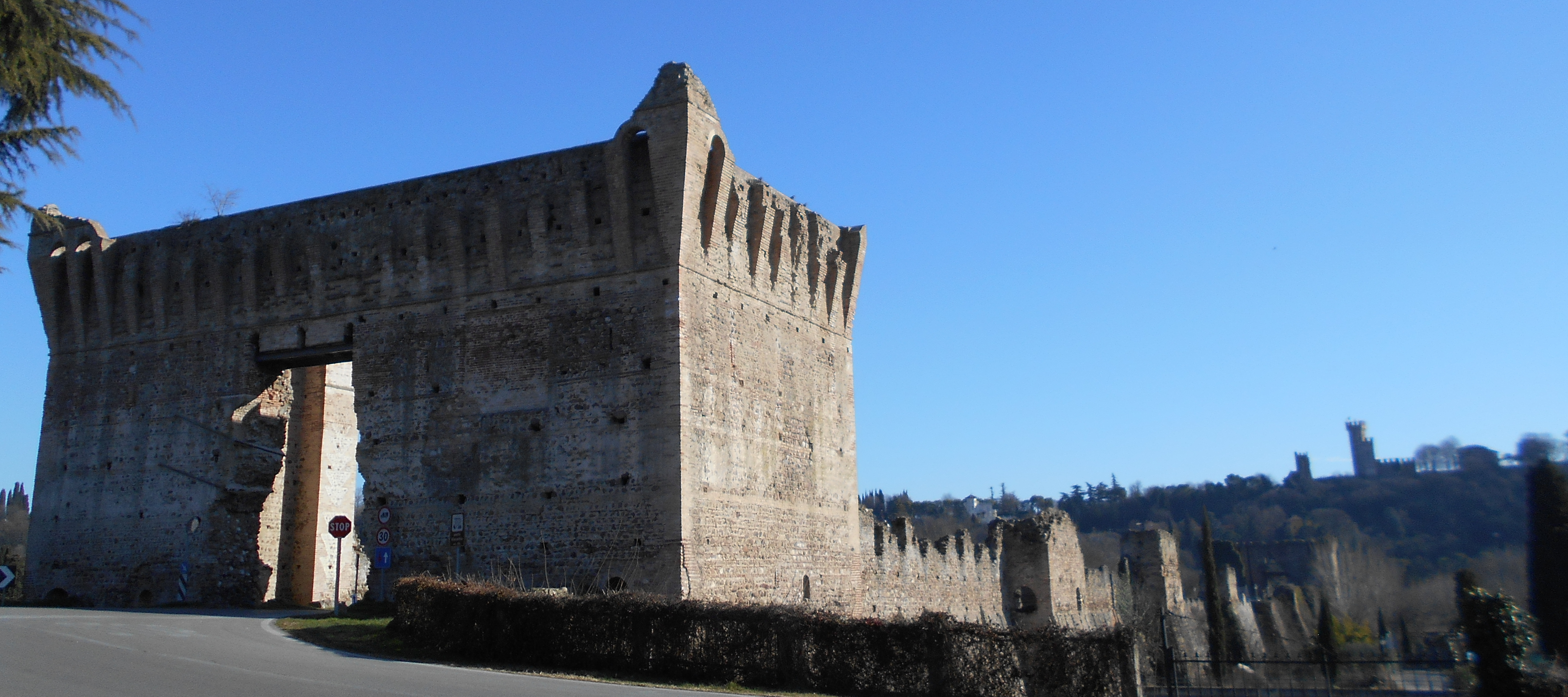 ponte fortificato visconteo, Borghetto, Valeggio sul Mincio